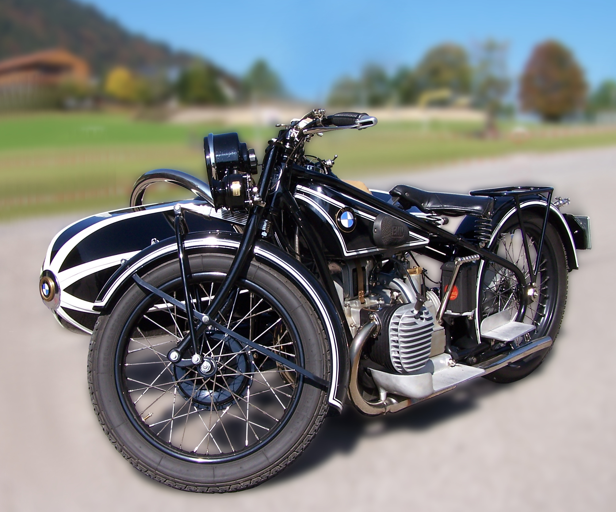 BMW R 62 mit Beiwagen am Oberjochpass